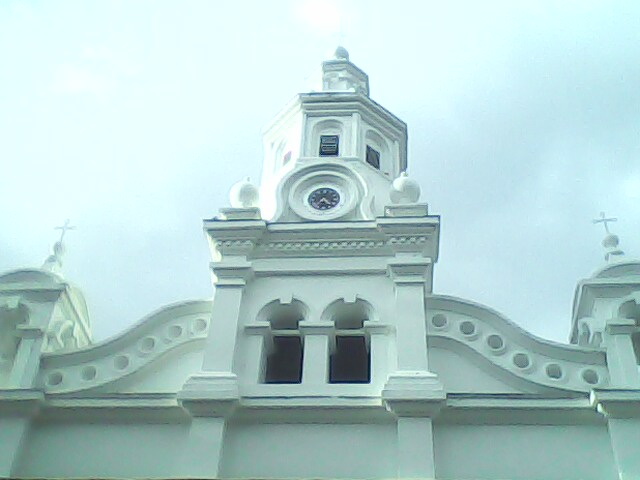 Es una iglesia emblematica de Salamiana y hasta del norte de Caldas